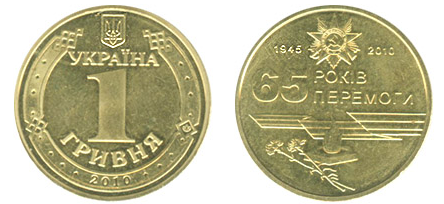 Оборотная монета номиналом 1 гривна (Украина) образца 2010 г.